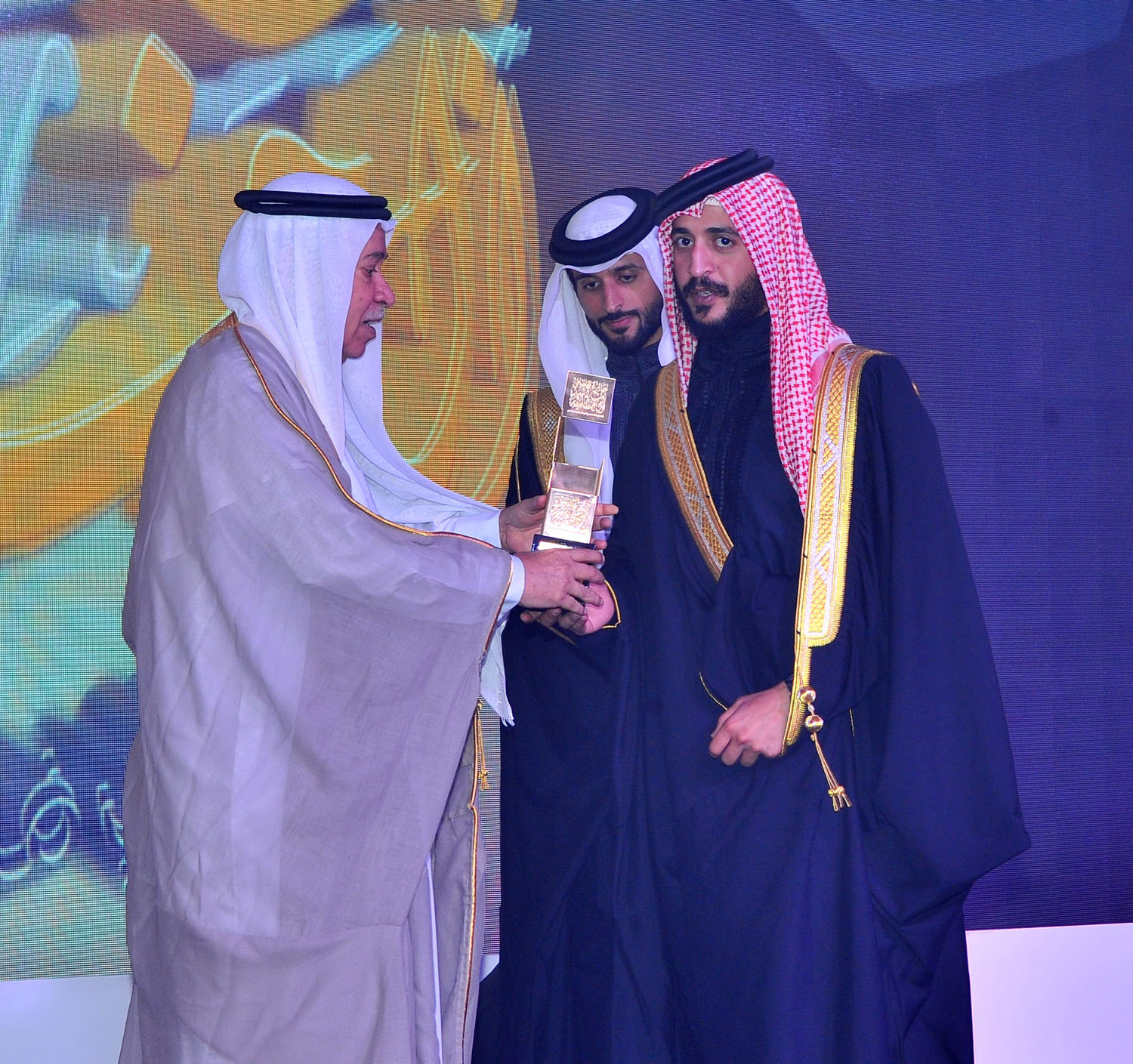 جائزة معالي الشيخ عيسى بن راشد آل خليفة للعمل التطوعي في المجال الرياضي 5 يونيو 2016